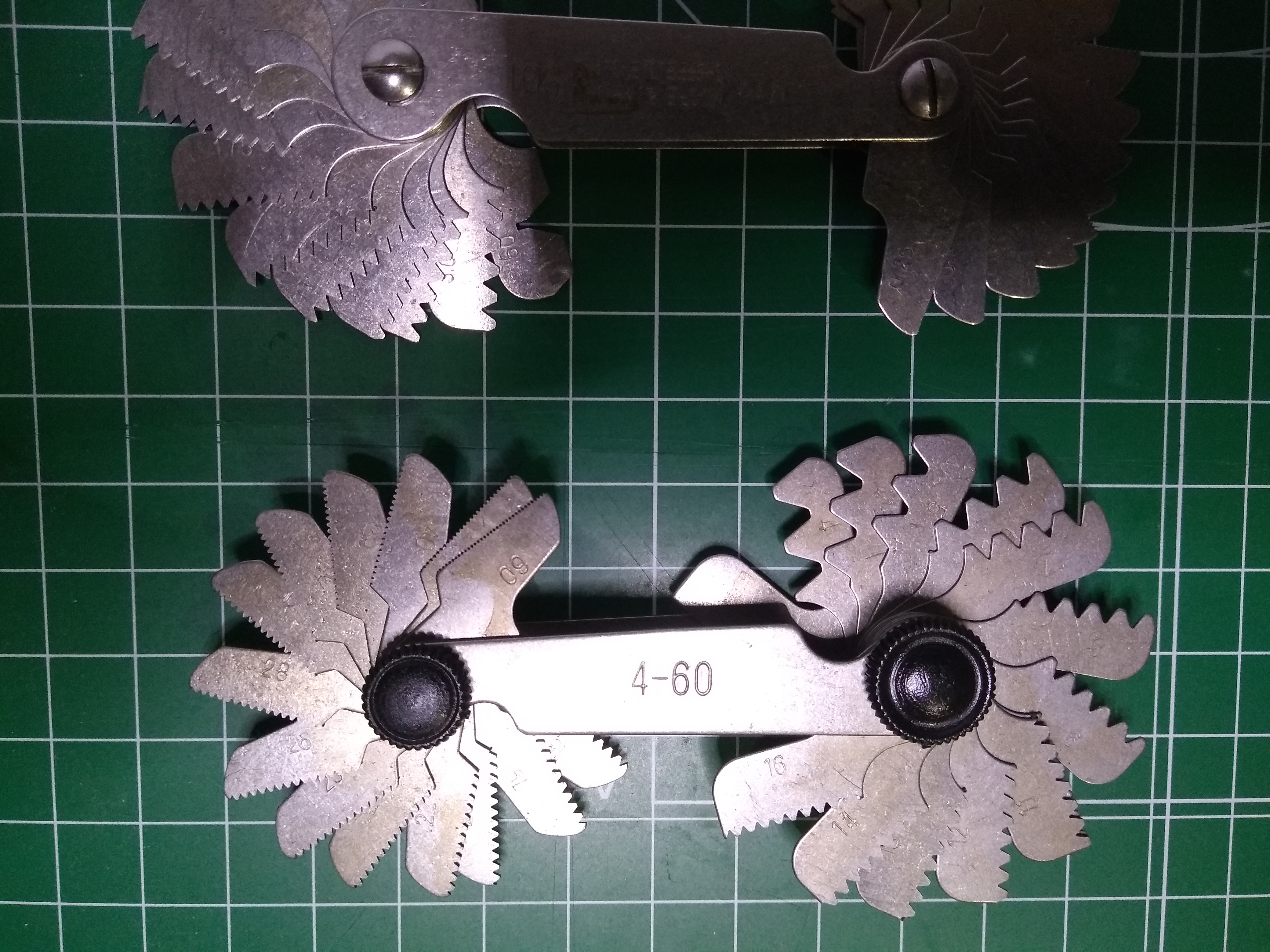 Galga de rosca. Los números indicados hacen referencia al nº de hilos por pulgada, siendo 4 el de mayor paso y 60 el de menor.